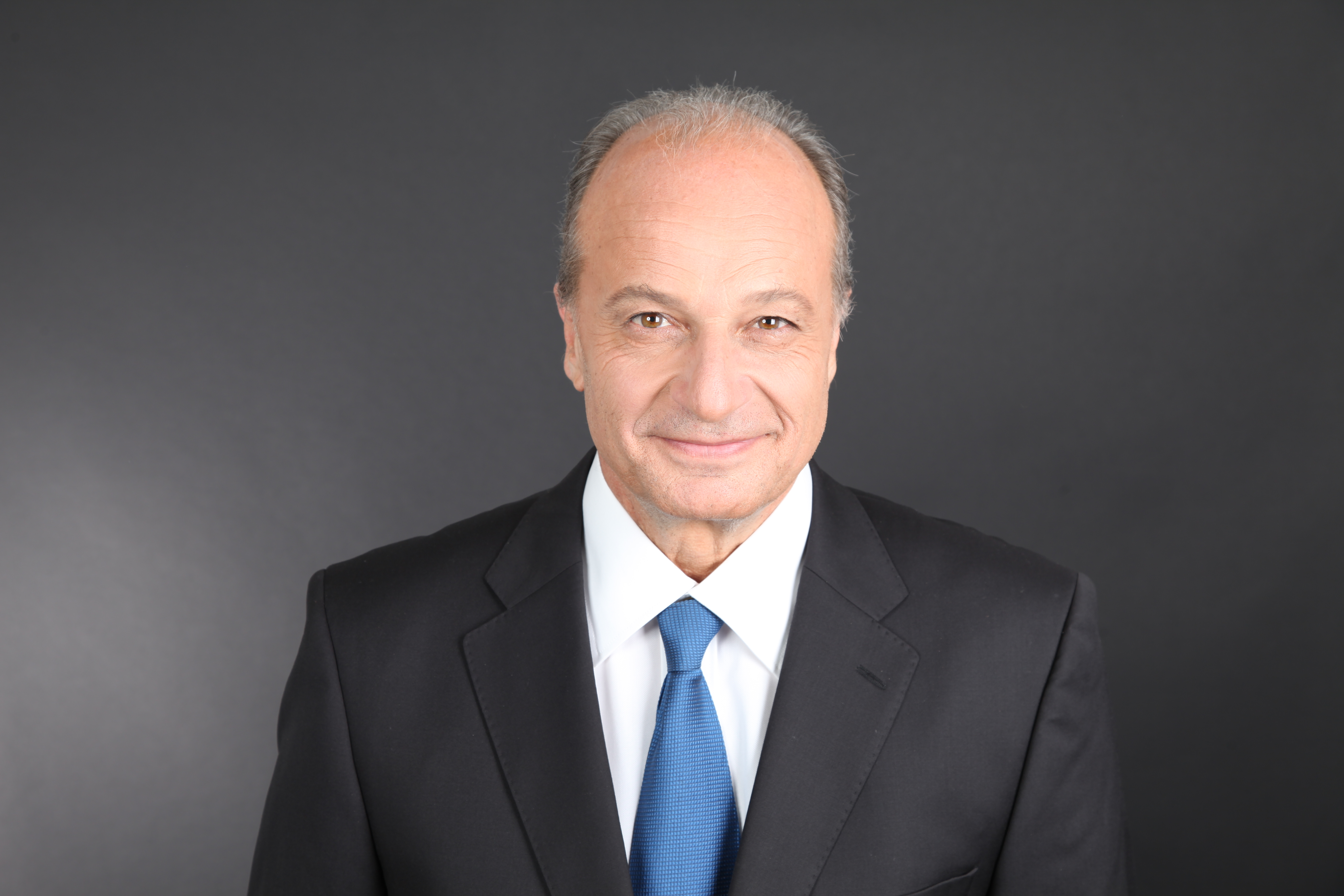 Filippo Leutenegger, Politiker, Mitglied von Zürichs Stadtregierung